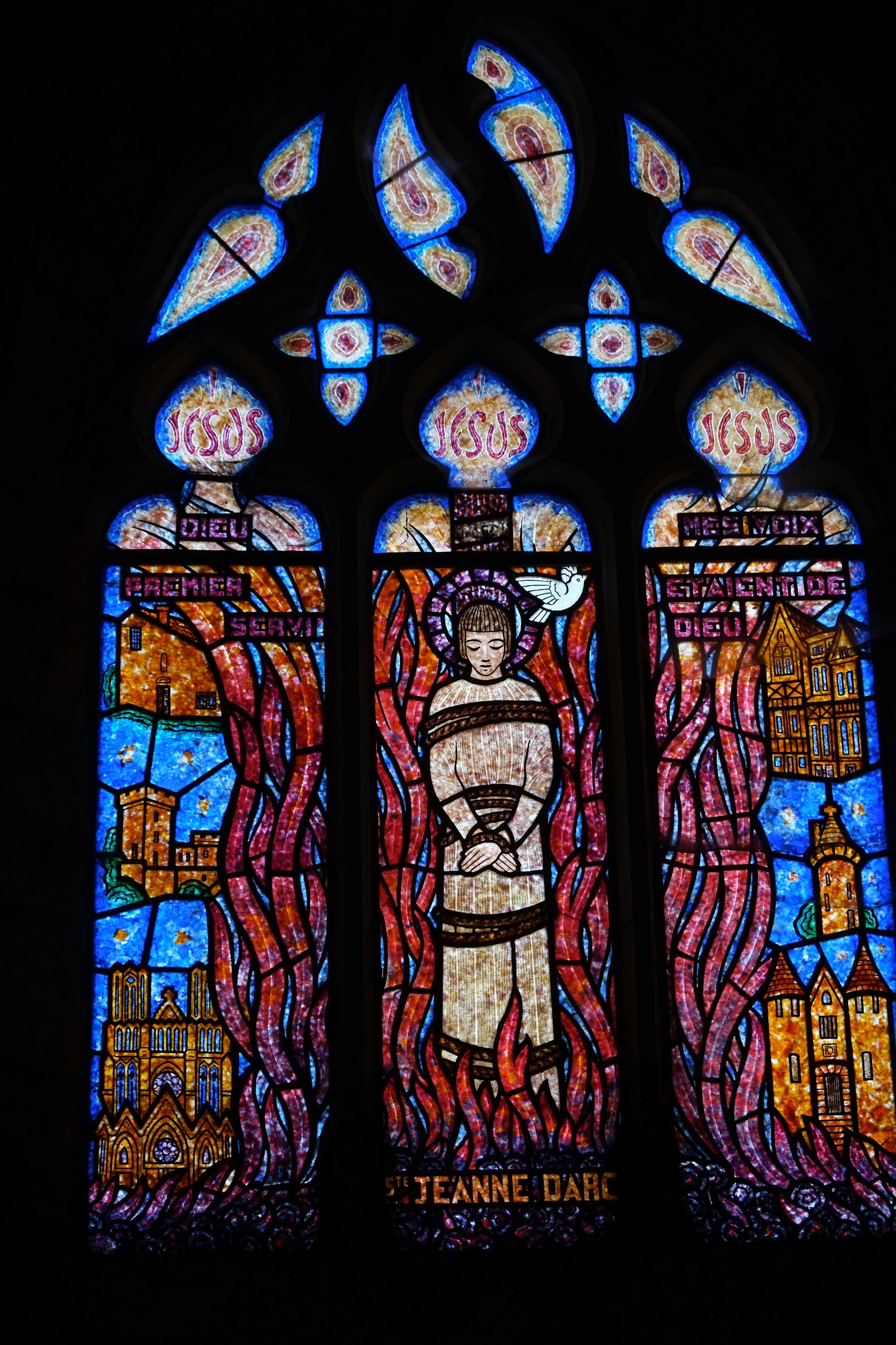 Bleiglasfenster in der Kirche Saint-Helier in Beuzeville im Département Eure, Frankreich; Darstellung: hl. Jeanne d’Arc